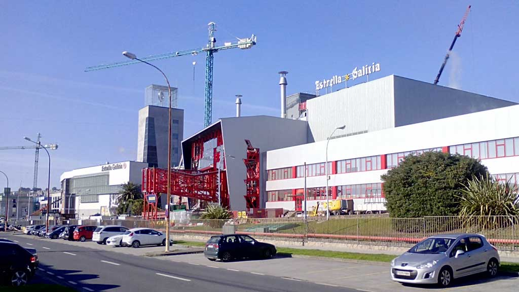 Estrella Galicia en 2017.